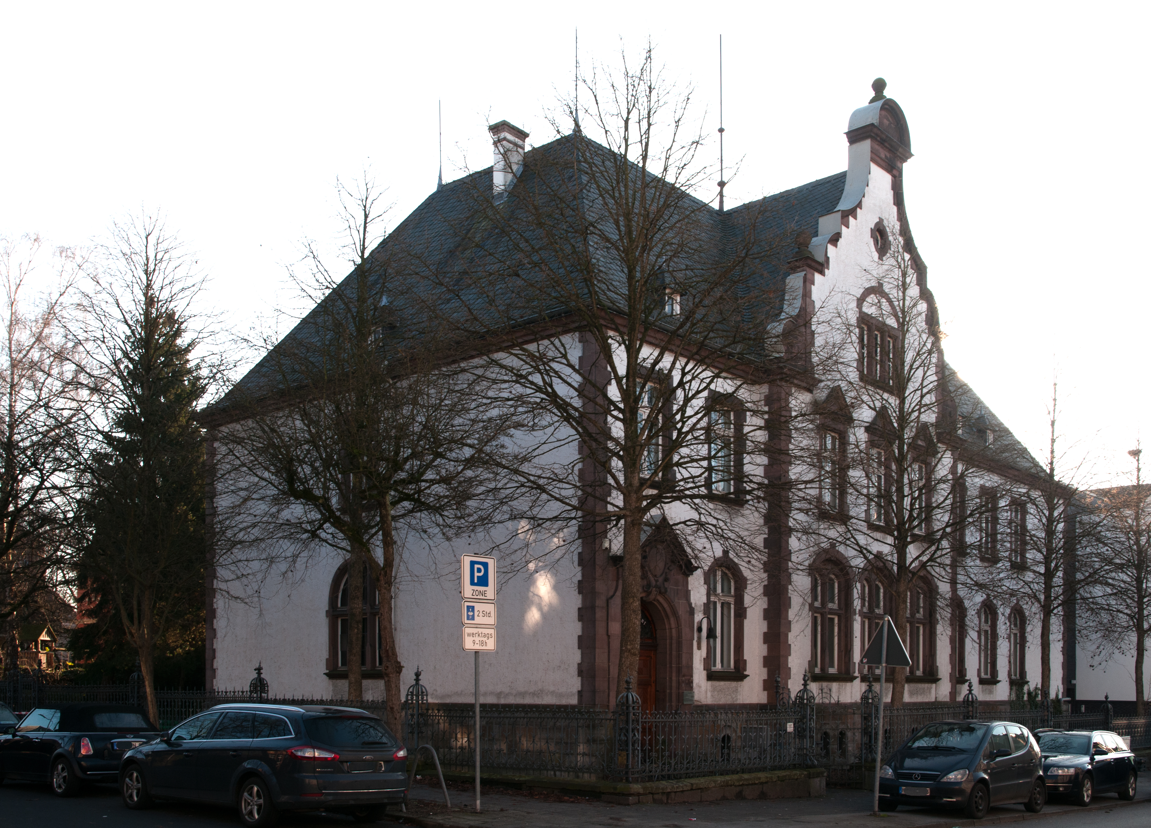 Altes Amtsgericht Neheim This image shows a heritage building in Germany, located in the North Rhine-Westphalian city Arnsberg (no. DL 137).